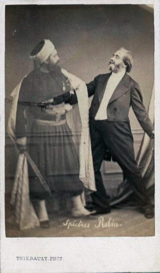 Photo-carte